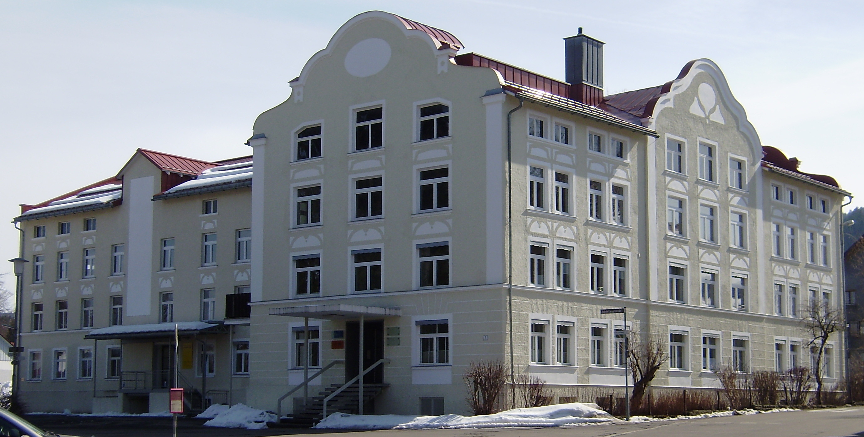 Die 1907 gegründete Strohhutfabrik Milz & Karg, Jakob-Lang-Str 2, Weiler iA, Westansicht. Errichtet von Architekt und Baumeister Georg Bufler.